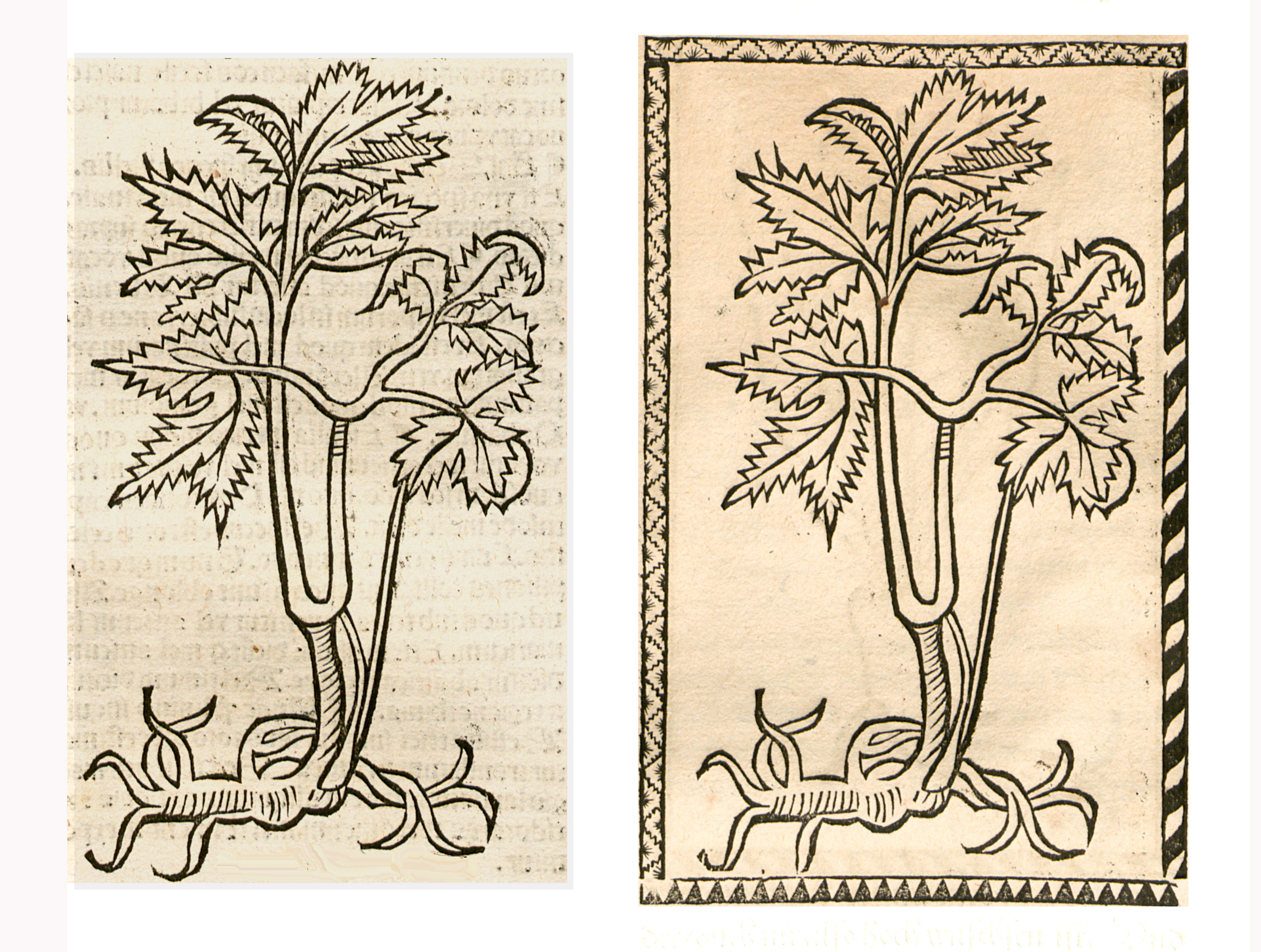 Abbildung von: Attich